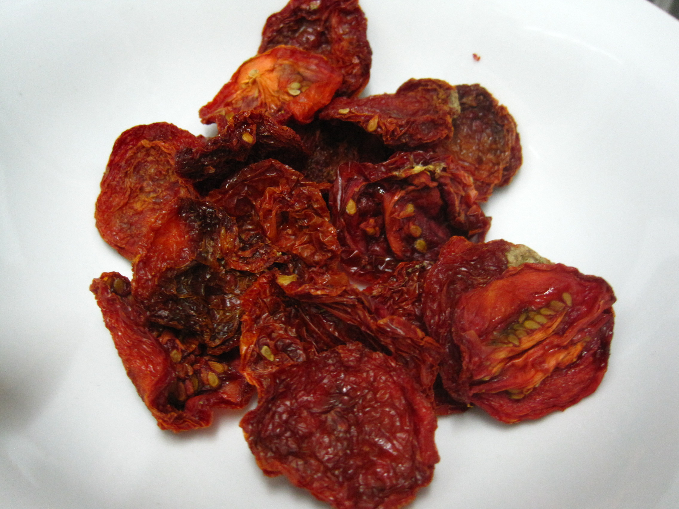 Sušeni paradajz